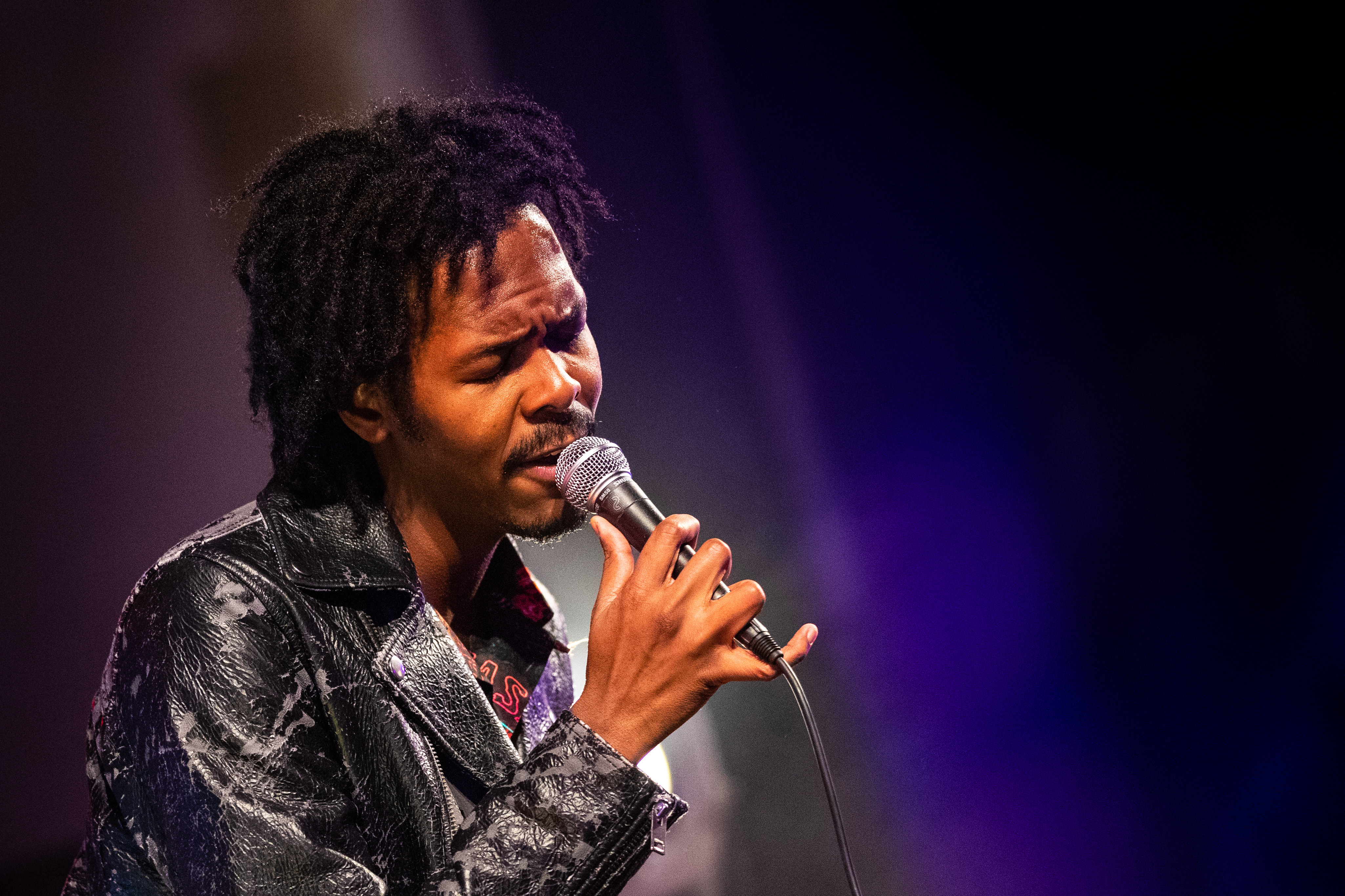 Artiest Jeangu Macrooy tijdens Eurosonic Noorderslag 2019